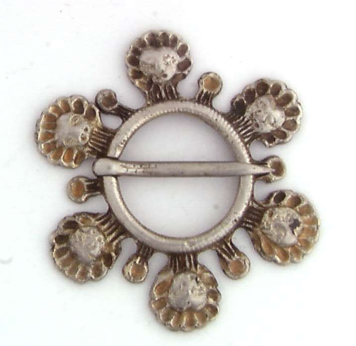 Støpt glibbsølje i forgylt sølv fra Lærdal i Sogn og Fjordane. Foto Ann-Lise Reinsfelt/Norsk Folkemuseum. NF.1994-0125.